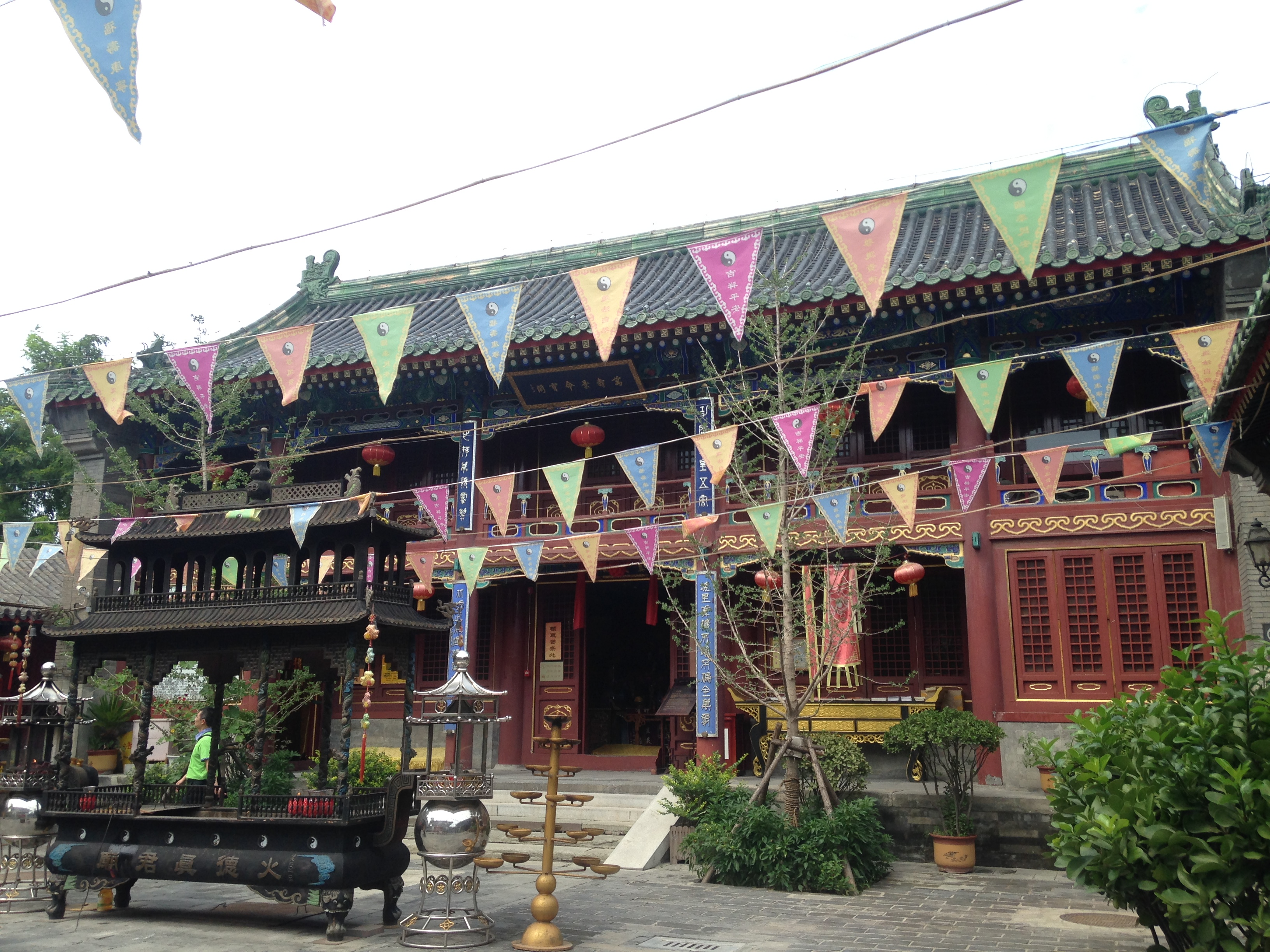 火徳真君廟の万寿景命宝閣